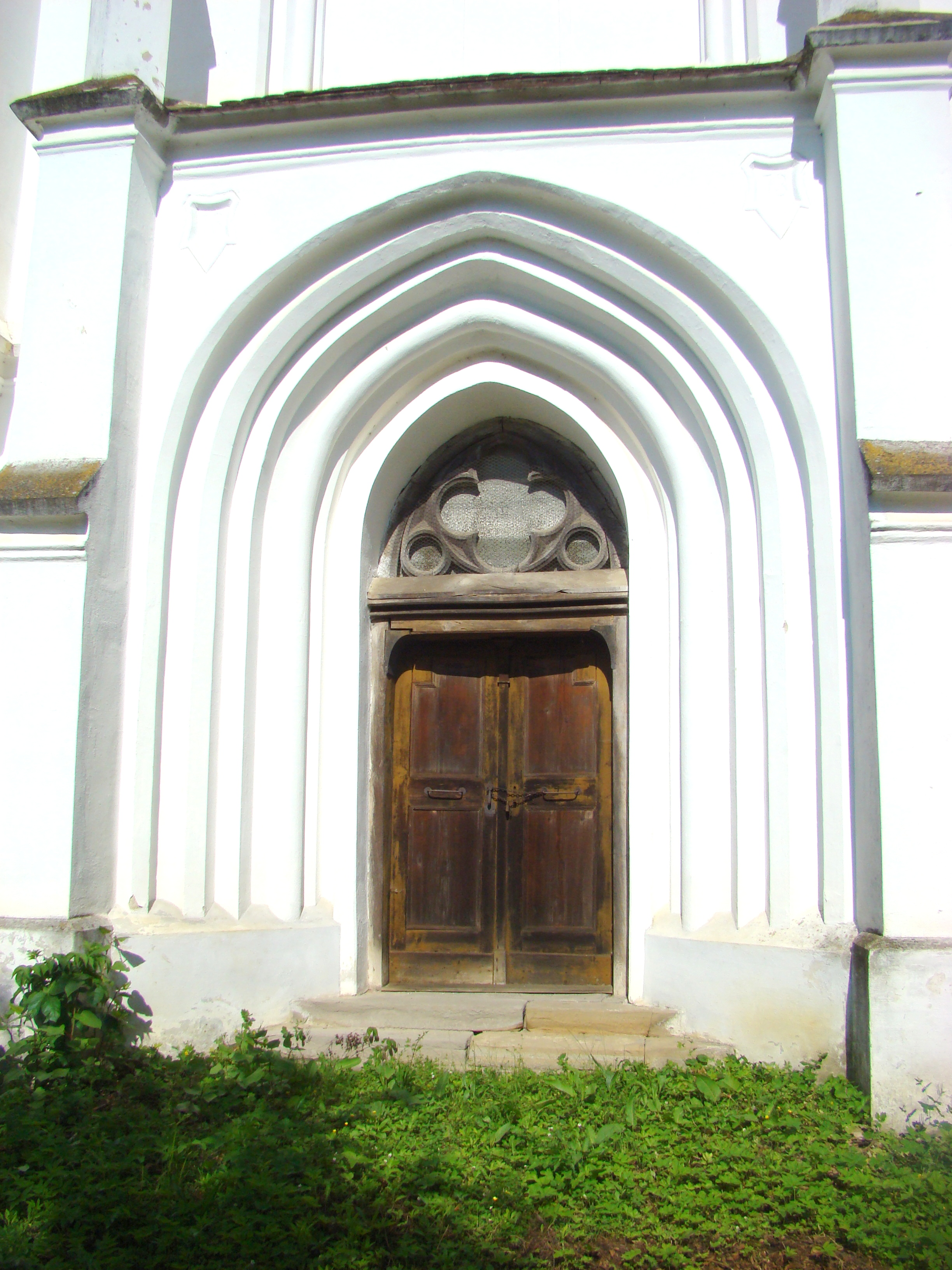 Biserica evanghelică, sat Senereuș; comuna Bălăușeri 01